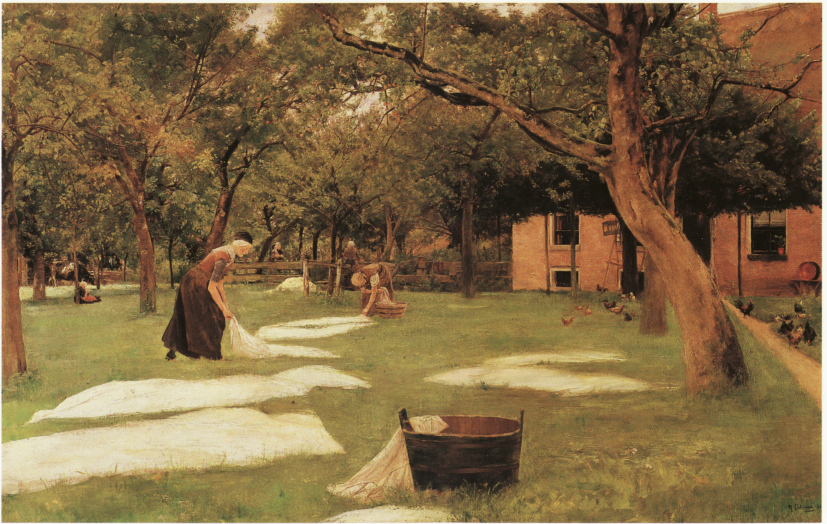 Darstellung der Herberge von Jan und Lammechien Mensel, Haus, Zweeloo